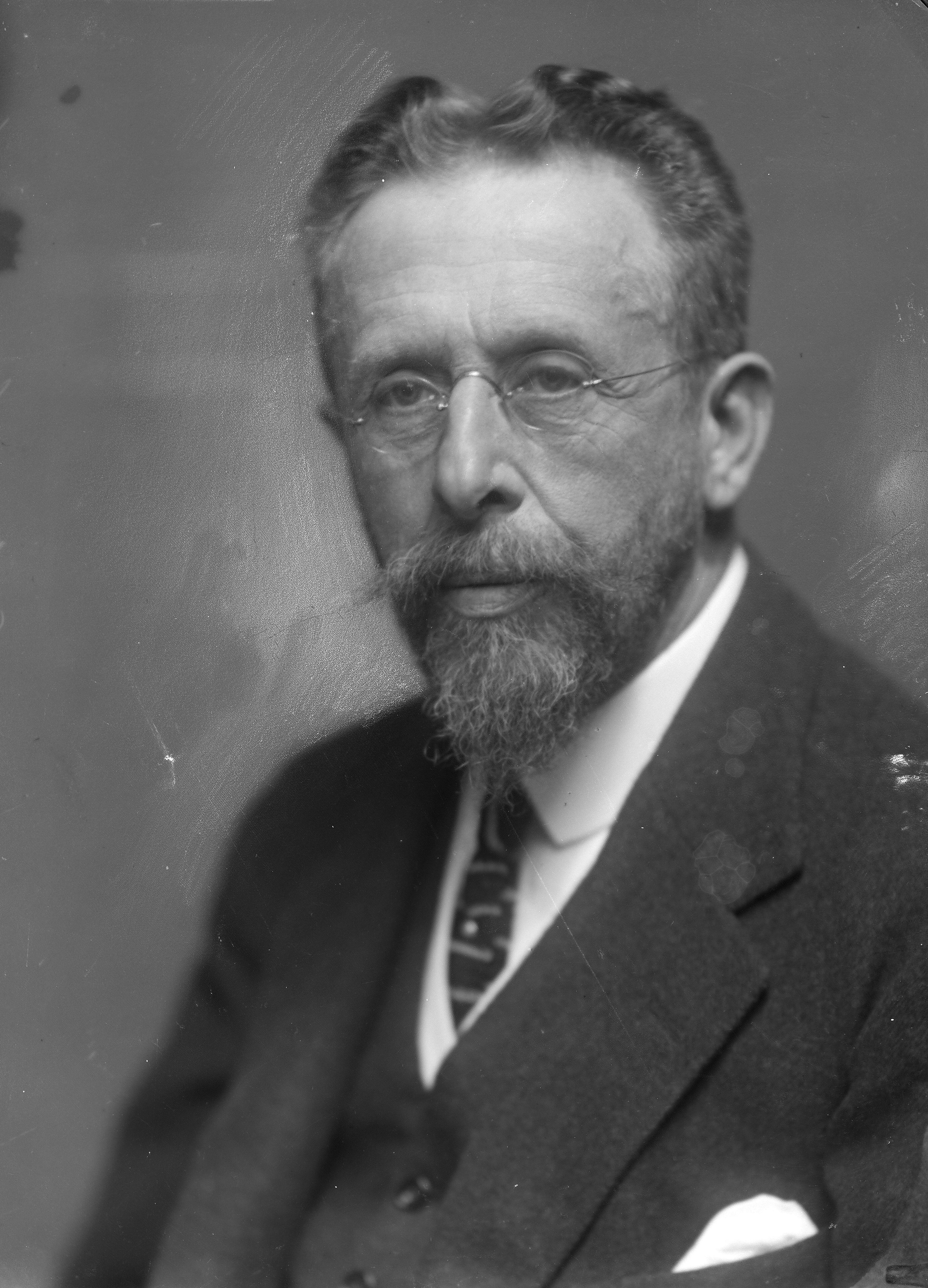 Beschrijving Portret van Dr Mendes de Leon Documenttype foto Vervaardiger Merkelbach, Atelier J. Collectie Collectie Atelier J. Merkelbach Inventarissen Afbeeldingsbestand 010164032980 Generated with Dememorixer